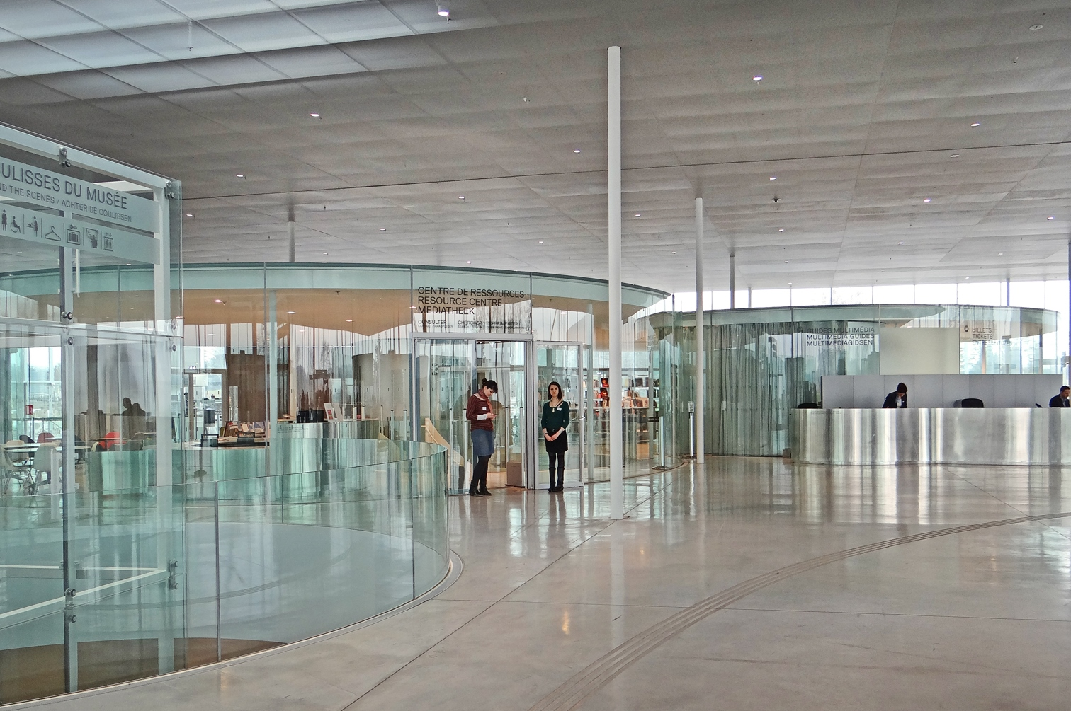 Au centre du hall d'accueil du Louvre Lens, se trouve le centre de ressources A gauche, l'escalier qui mène au sous-sol (divers services, espace multimédia de présentation des activités scientifiques et technique autour des œuvres, vue sur les réserves et sur les ateliers de restauration à travers des baies vitrées) Dans le hall d'accueil du Louvre Lens, l'entrée du centre de ressources où s'est déroulée la journée d’étude du vendredi 8 mars 2013, " Usages de la photographie dans les musées", co-organisée par : - Louvre-Lens - Direction Générale des Patrimoines, Ministère de la culture - Direction de la politique des publics et de l’éducation artistique du Musée du Louvre - Master Expo-Muséographie, Université d’Artois. Le site de la rencontre Photo prise à l'ouverture du musée. Le bâtiment du Louvre Lens a été conçu par l'agence d'architecture SANAA (Kazuyo Sejima et Ryue Nishizawa) Le site du Louvre Lens